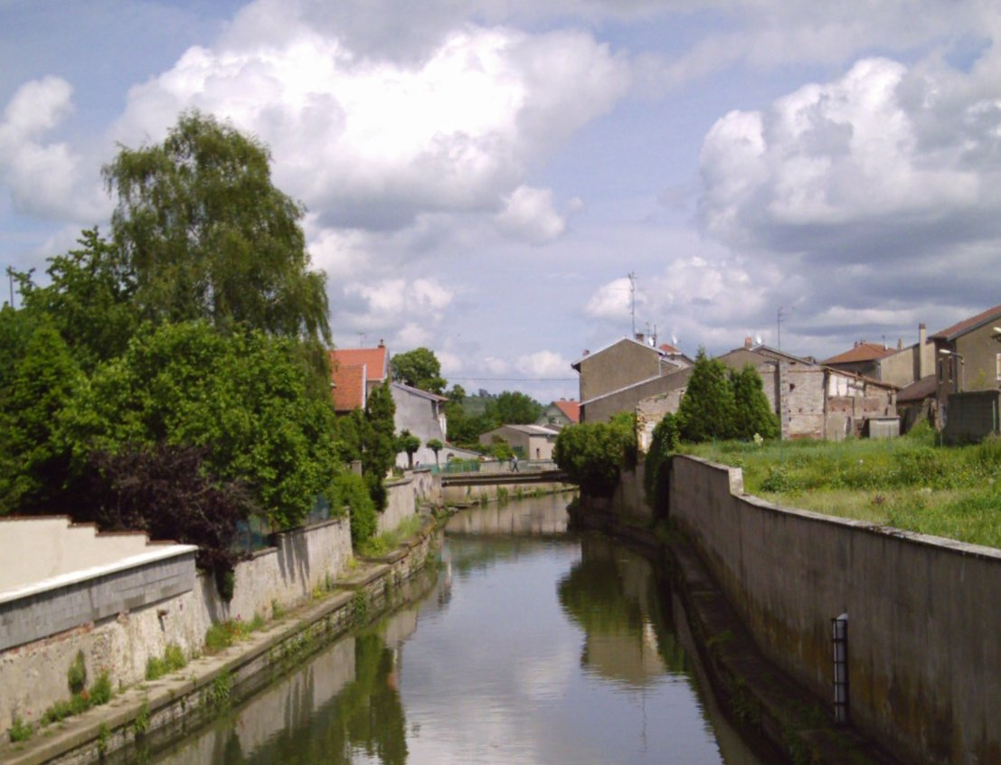 Vic-Sur-Seille 57 France 28 mai 2006 La Seille depuis le pont de la rue Liegeoise